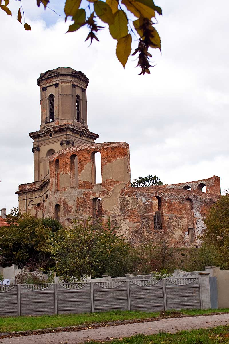 Szprotawa-kościół ewangielicki